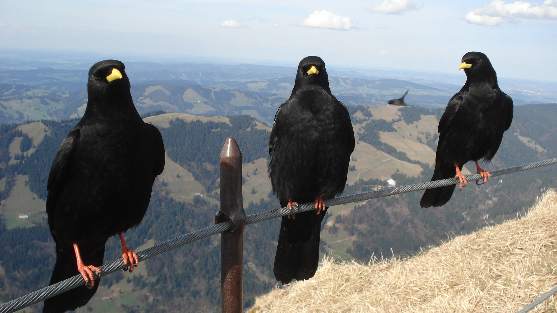 drei Alpendohlen auf dem Hochgrat